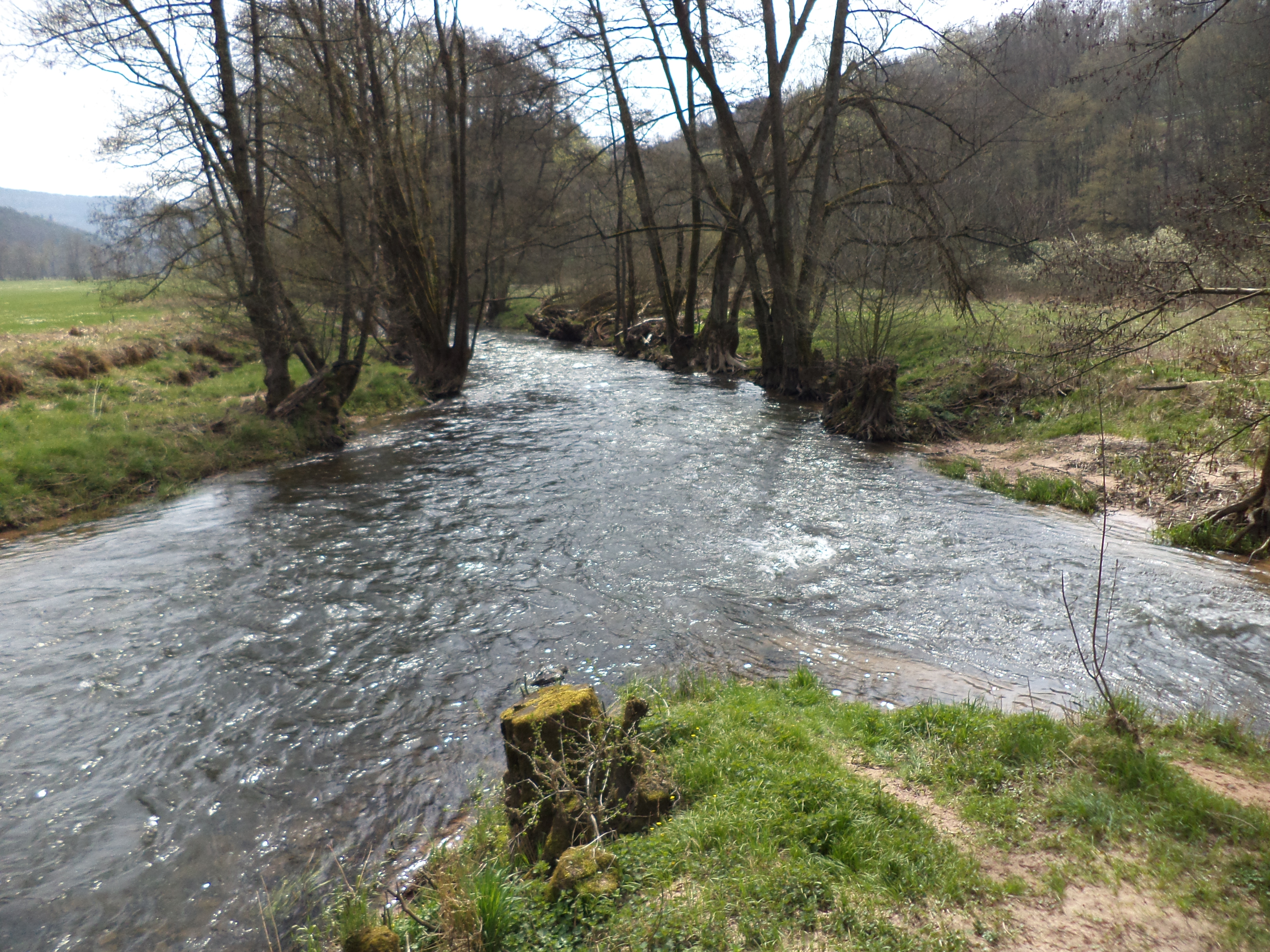 Die Jossa (rechts) mündet in die Sinn (links), NSG Sinnwiesen von Altengronau